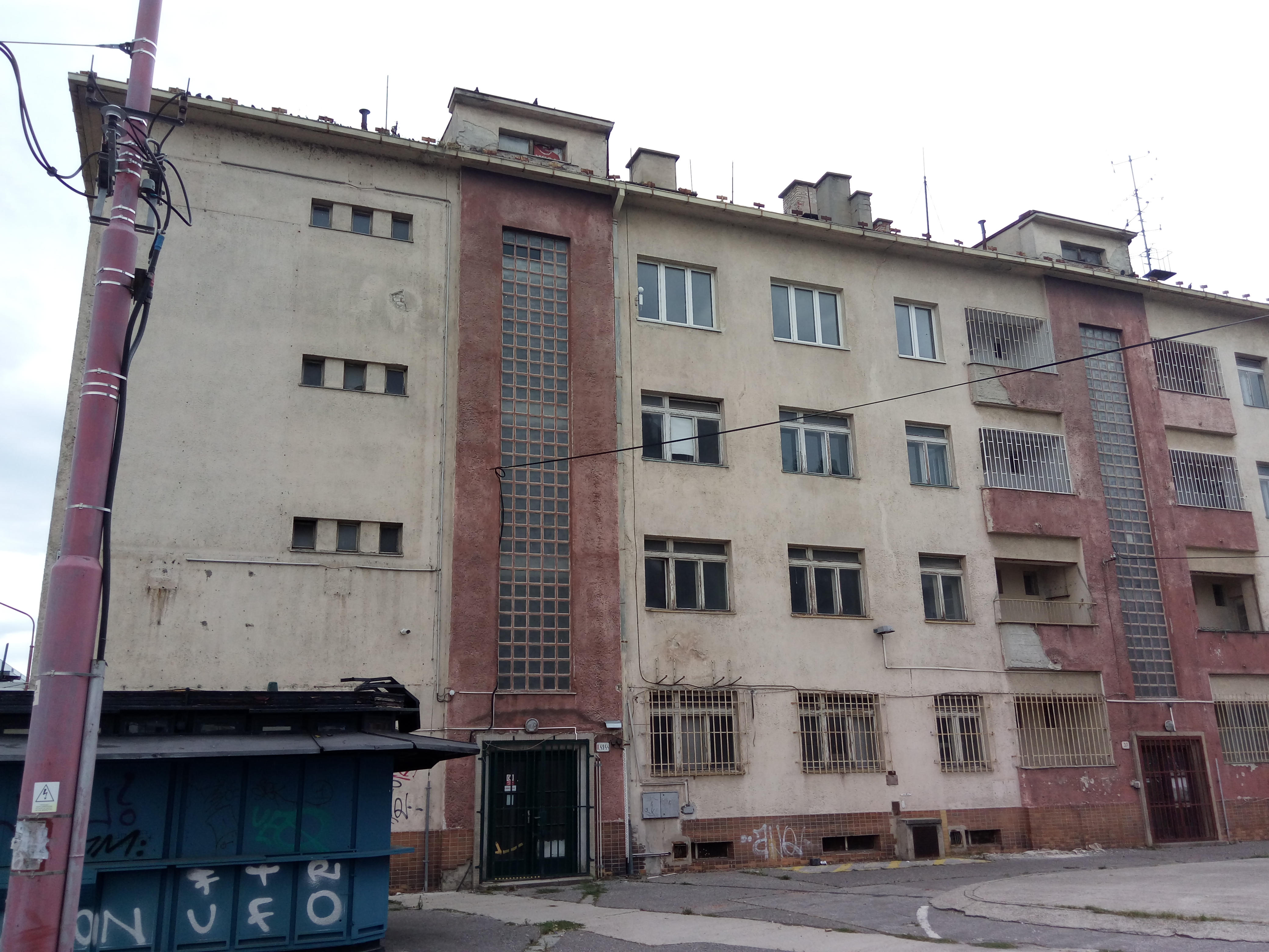 Mlynské nivy 37-41, Ružinov, Bratislava